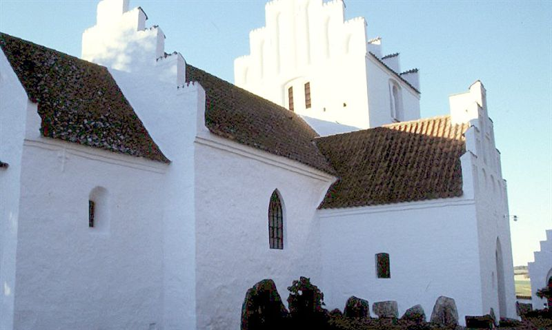 Bromme Kirke i Danmark. Kirken set fra nordøst